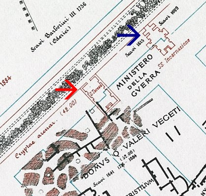 Pianta di Lanciani